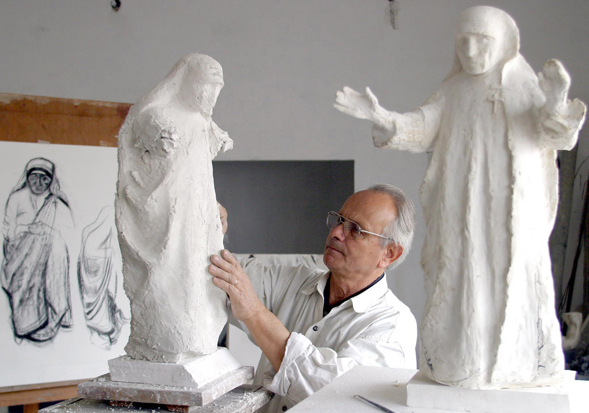 Duke punuar per Nene Terezen